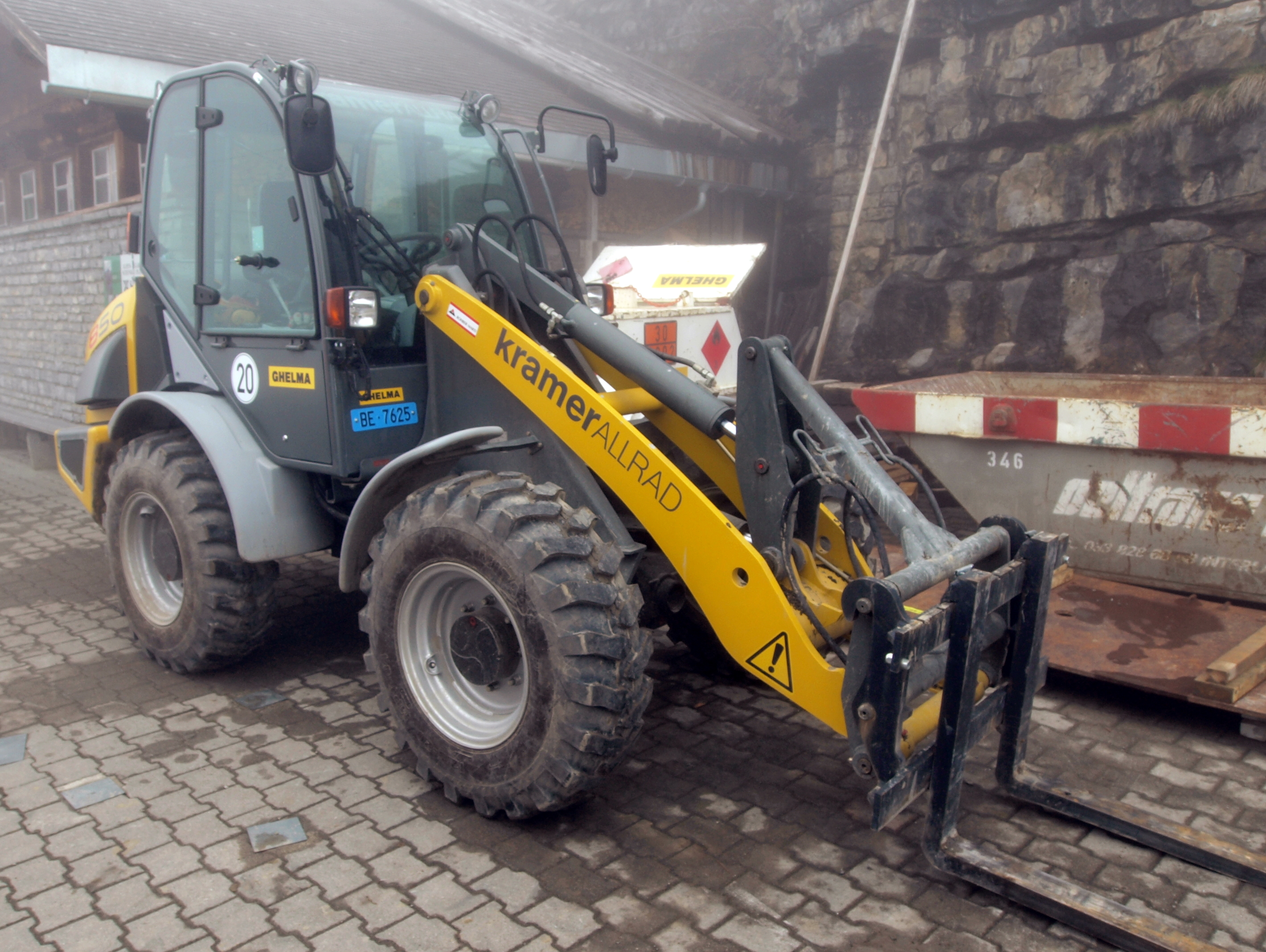 Kramer Allrad 850.